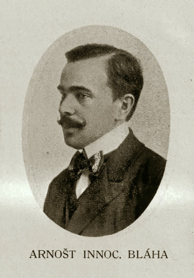 Inocenc Arnošt Bláha (1879 - 1960), Český sociolog, filosof a pedagog.